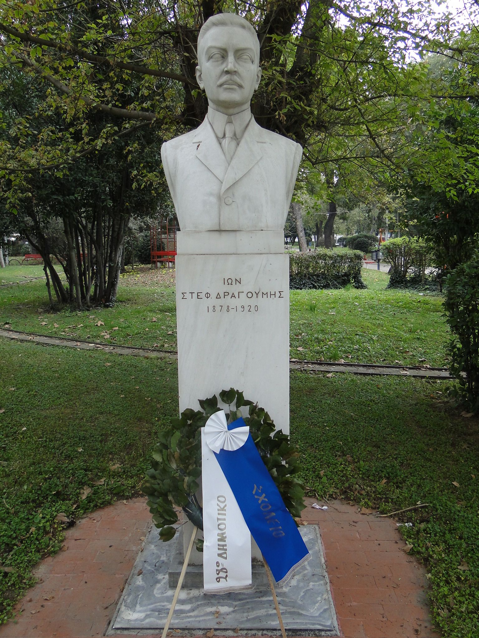 Προτομή του Ίωνος Δραγούμη στη Θεσσαλονίκη.